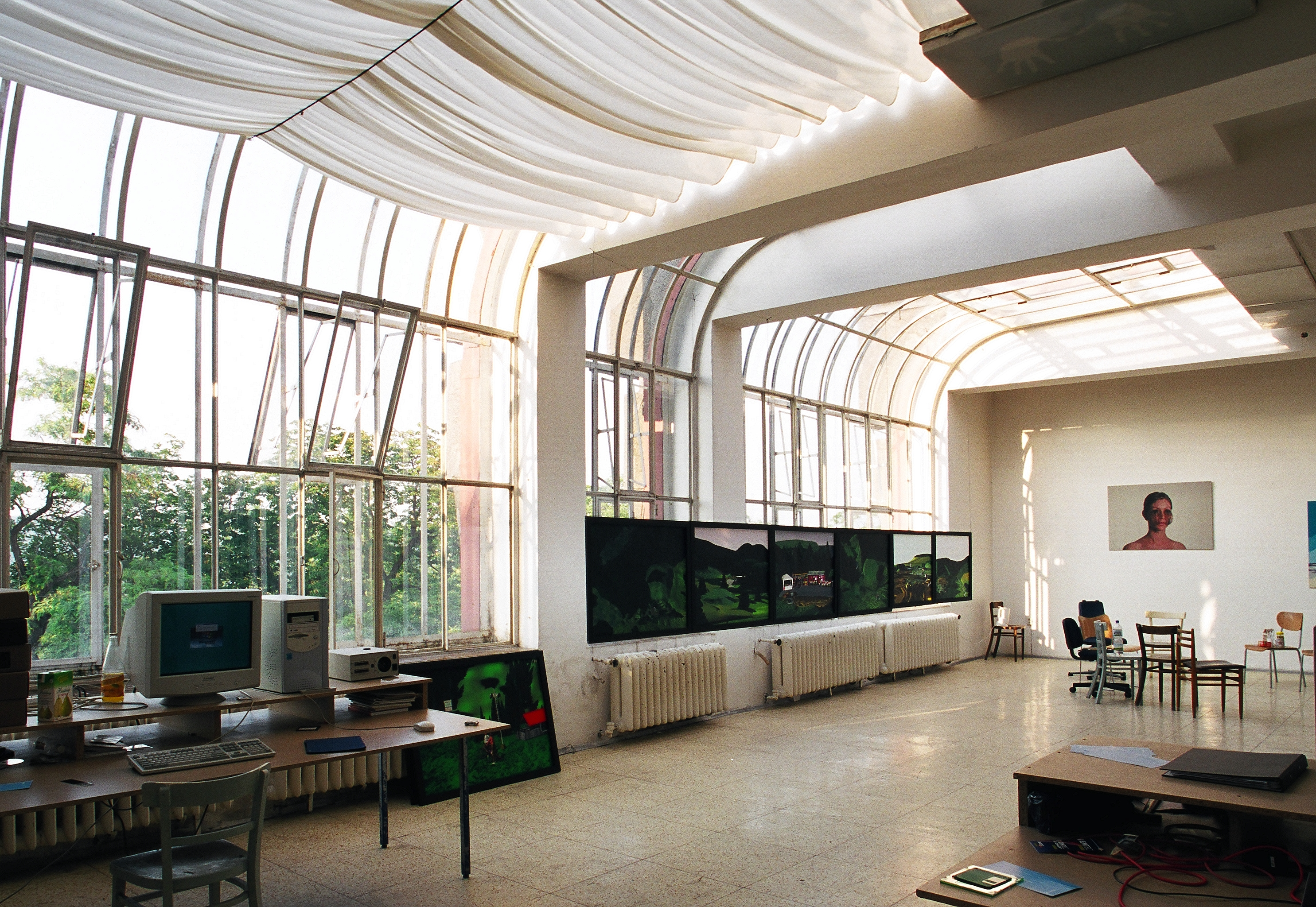 Interiér ateliéru AVU